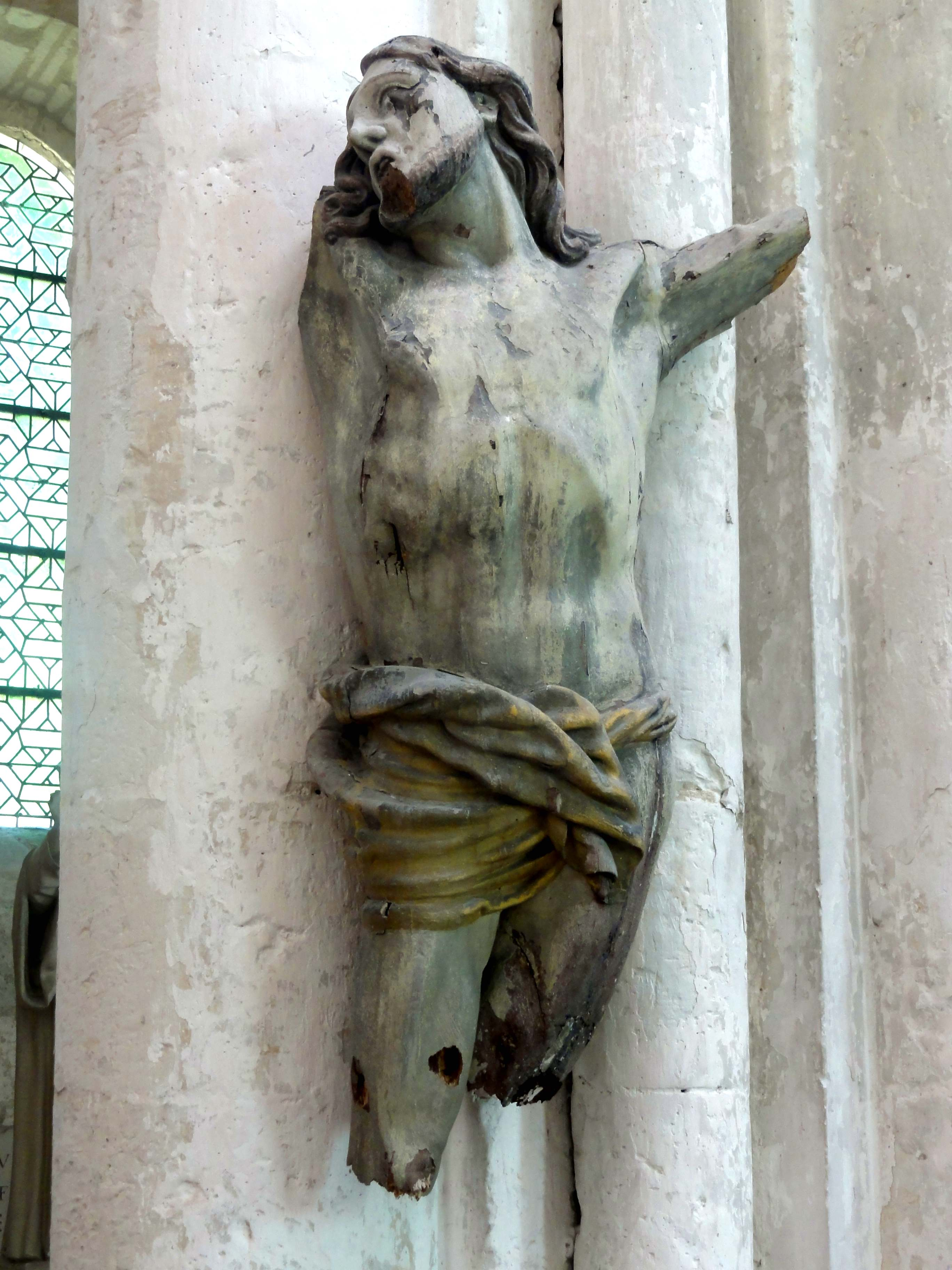 Chœur, Christ mutilé du XVIIIe siècle.